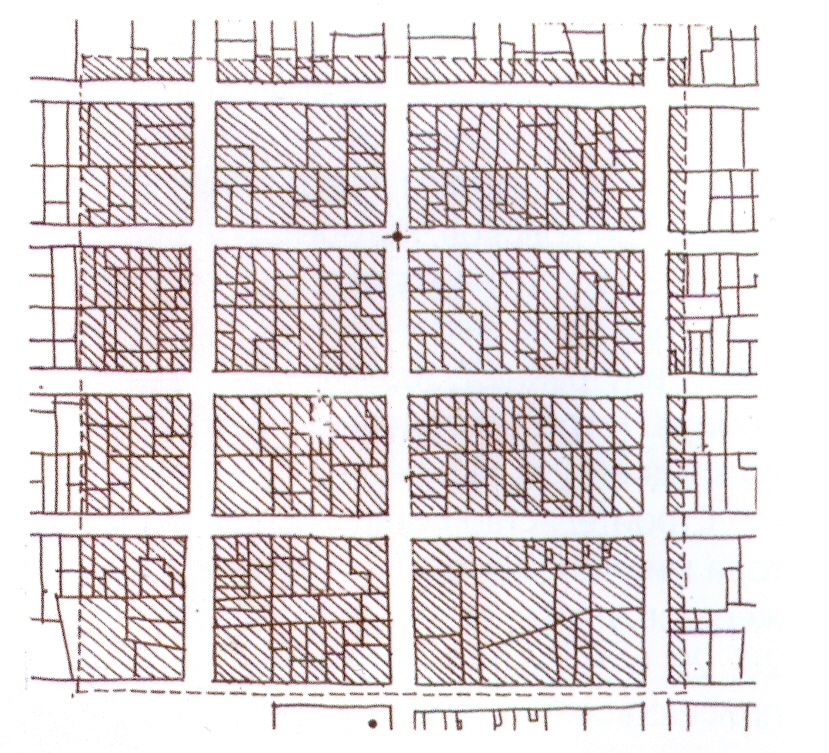 План площади до строительства Кафедрального собора (1851 г.)